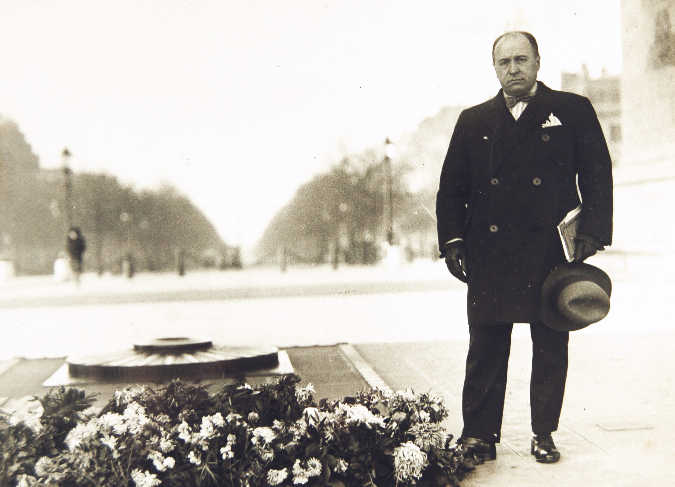 Gabriel Boissy à côté de la tombe du Soldat inconnu, photo issue du Fonds Bibliothèque Méjanes, Aix-en-Provence, droits réservés